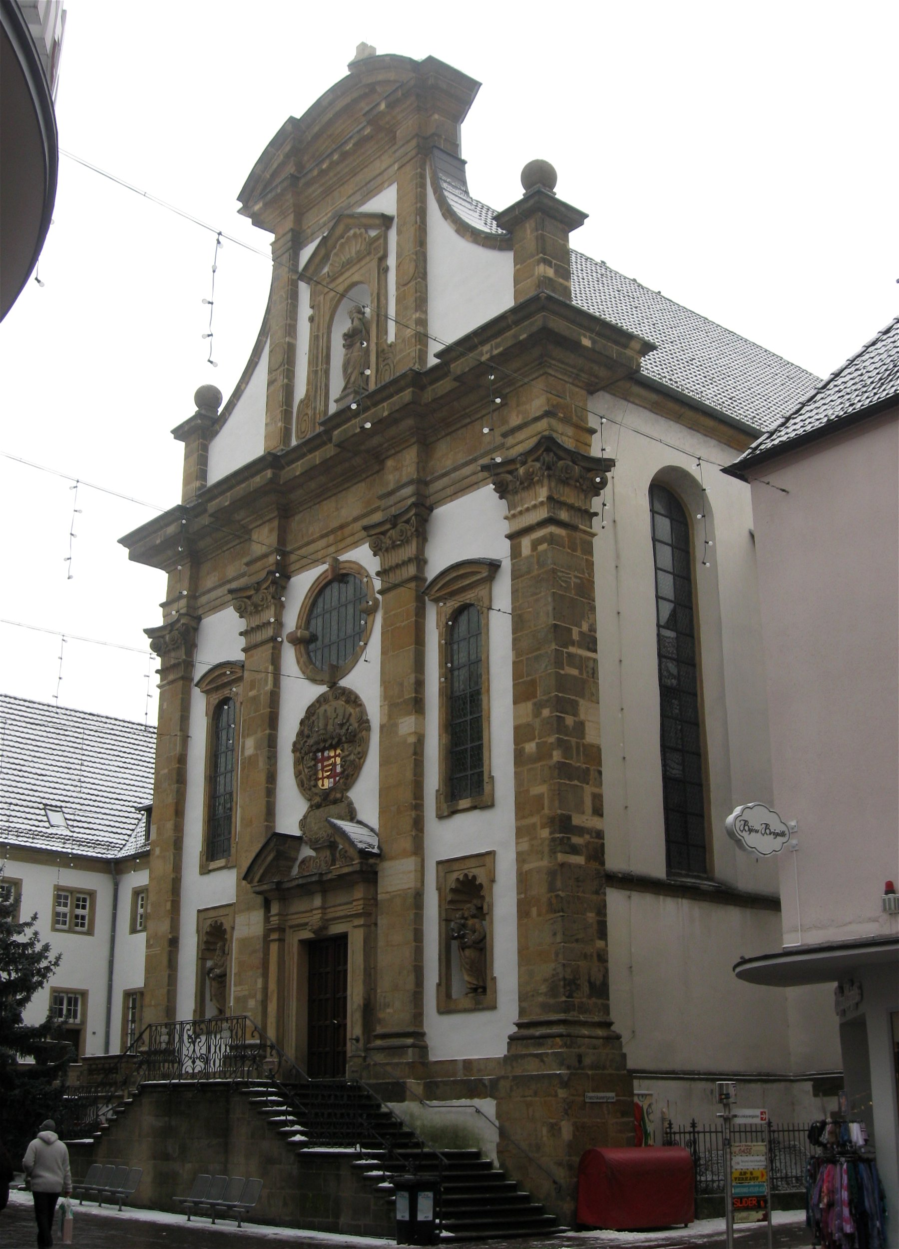 Franziskanerkirche, Paderborn